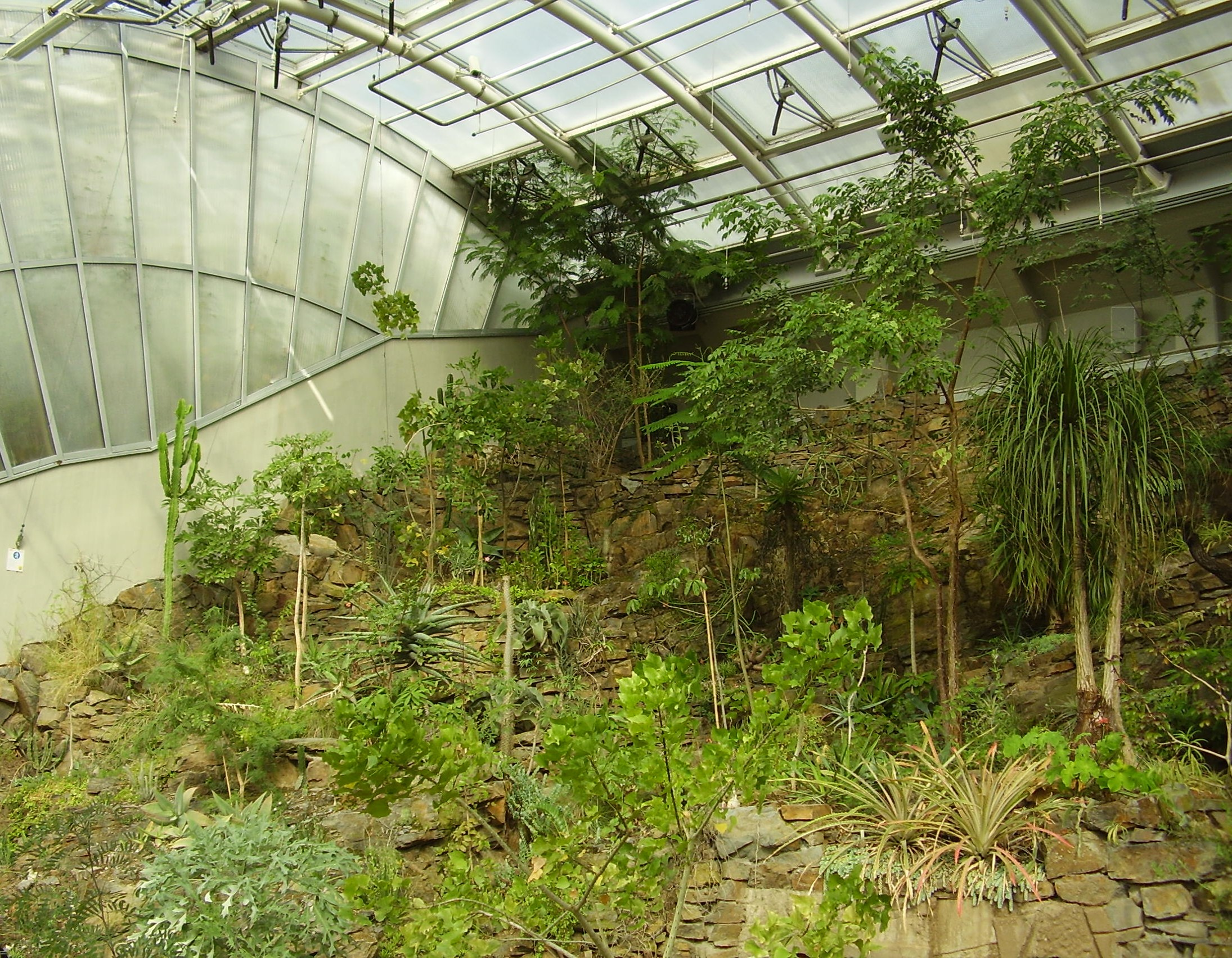 Skleník Fata Morgana, Praha